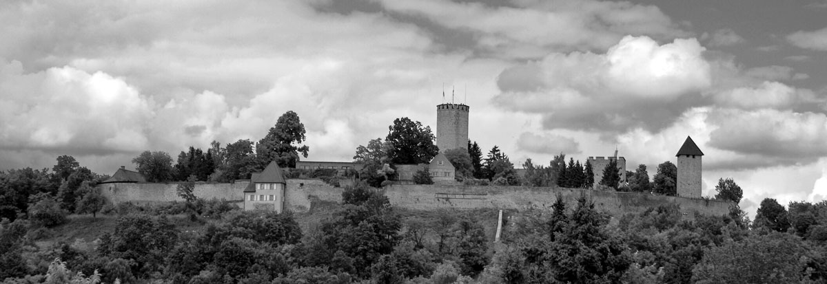 Burg in der Stsdt Burglengenfeld